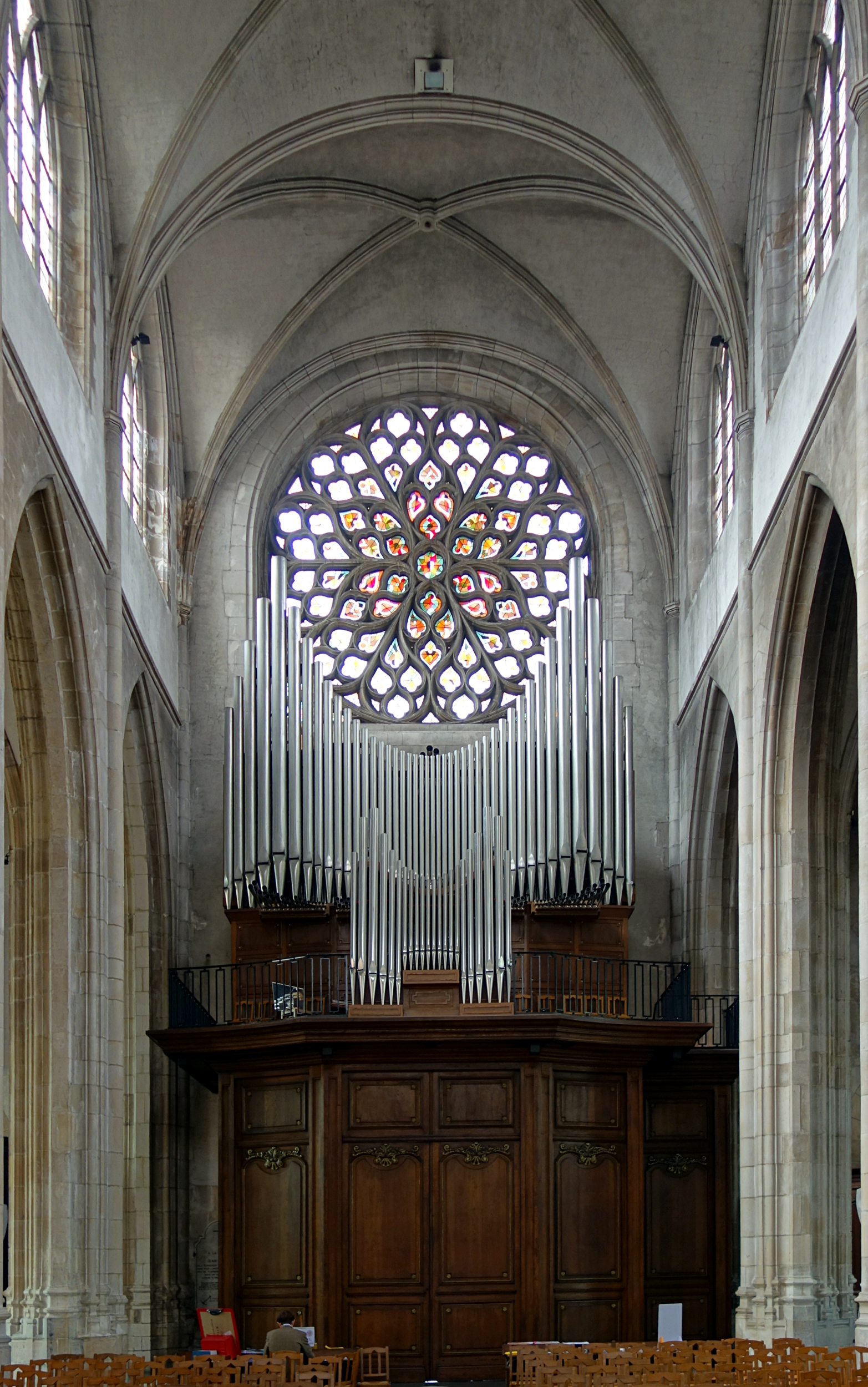 Le grand orgue de l'église Saint-Eloi de Dunkerque.